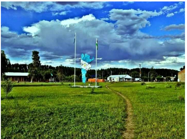 paraje de Vlle Azyl en el departamento El Cuy en la provincia de Rio Negro